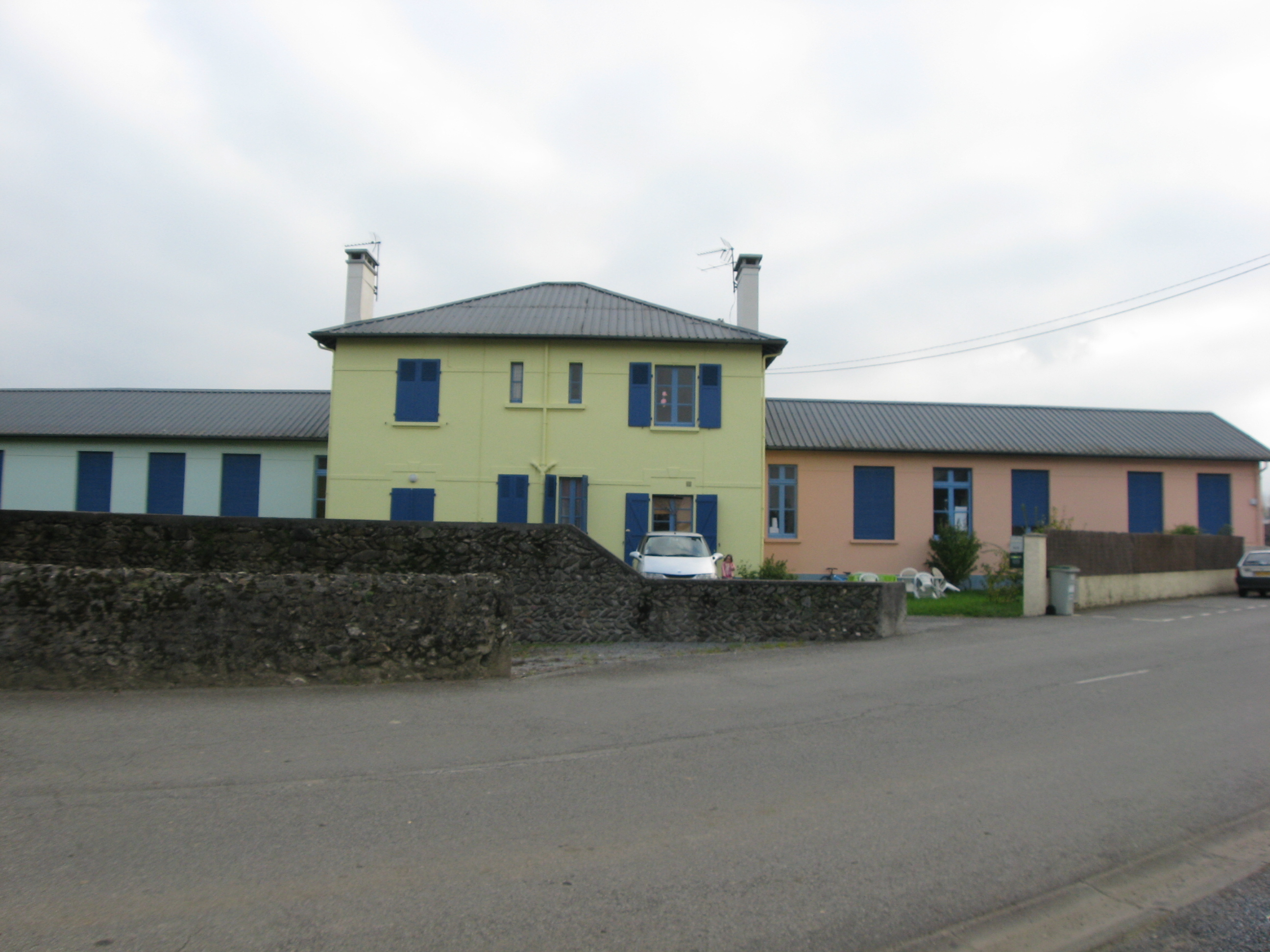 Vue de l'école d'Agnos (Pyrénées Atlantiques) Pyrénées).